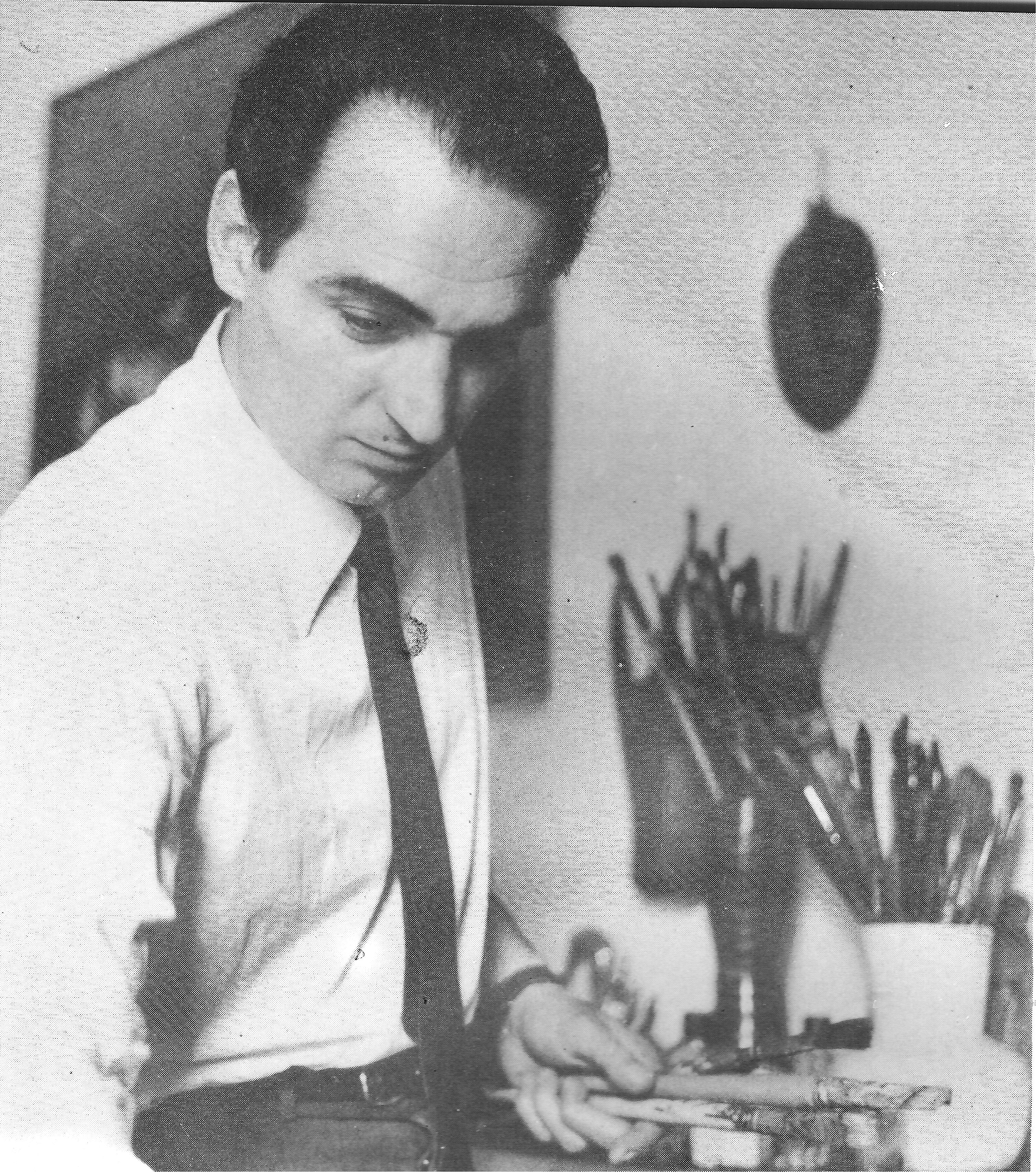 Una foto dell'artista Venino Naldi a lavoro nel suo studio